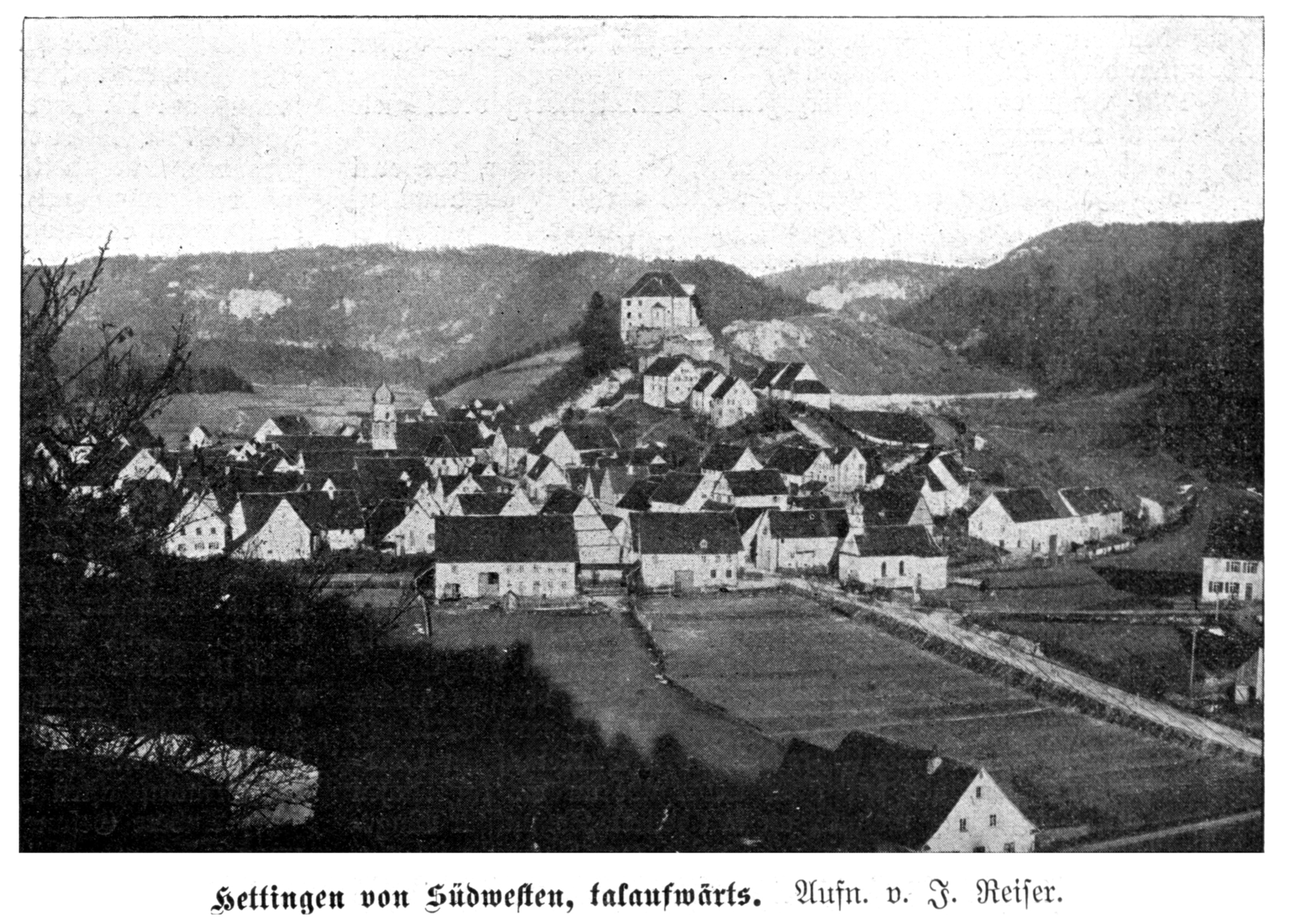 Hettingen von Südwesten, talaufwärts. (vor 1905)